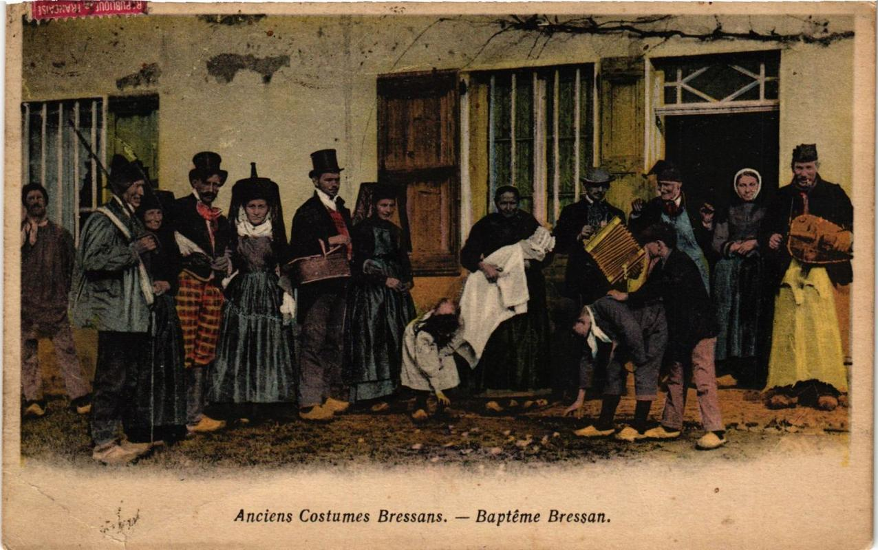 Baptême en Pays de Bresse.